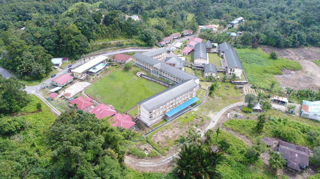 Pandangan atas SK Pantu